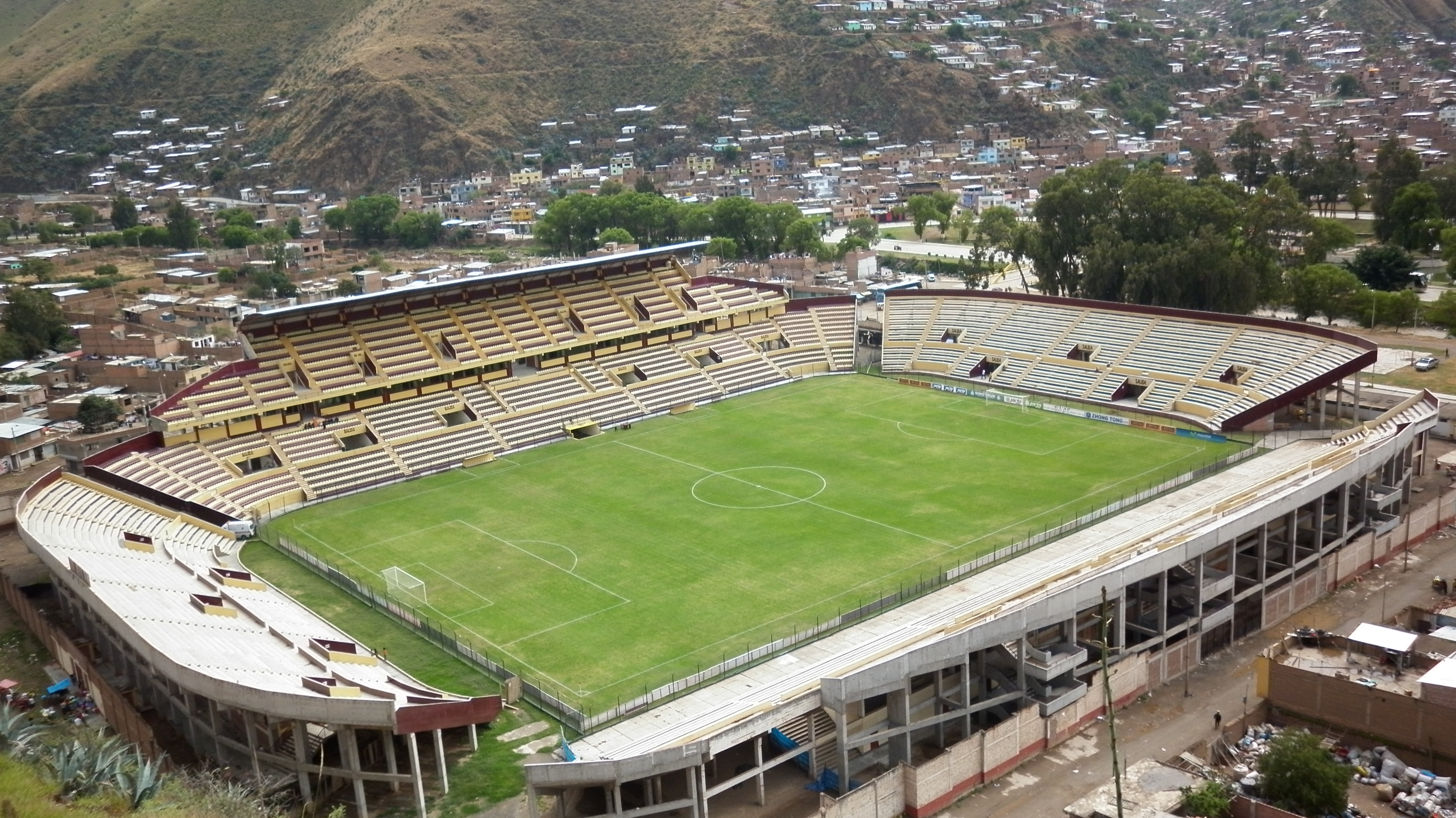 ESTADIO HERACLIO TAPIA LEON CAPACIDAD 28000 ESPECTADORES